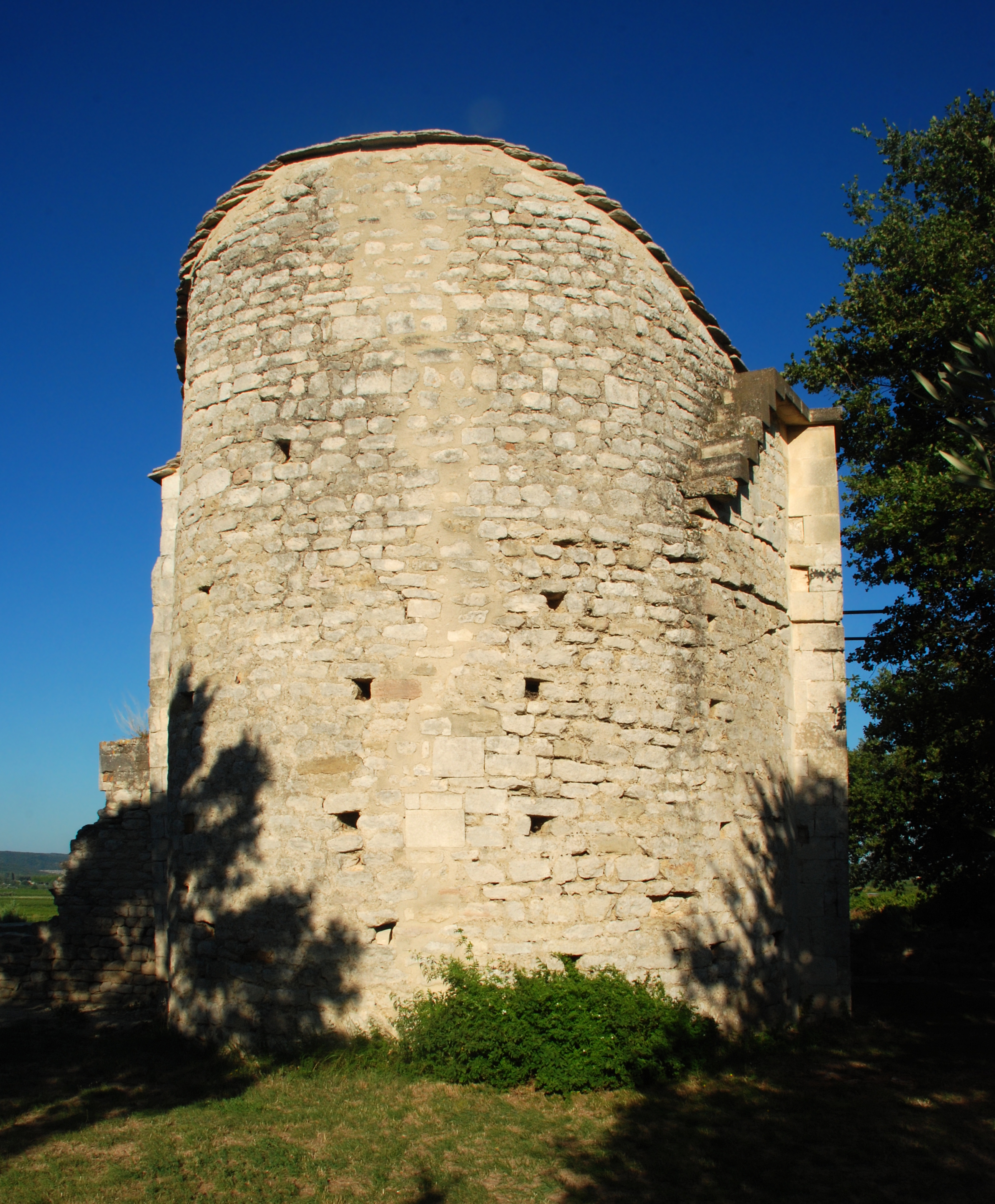 France - Gard - Chapelle Saint-Étienne de Saint-Hilaire-d'Ozilhan .